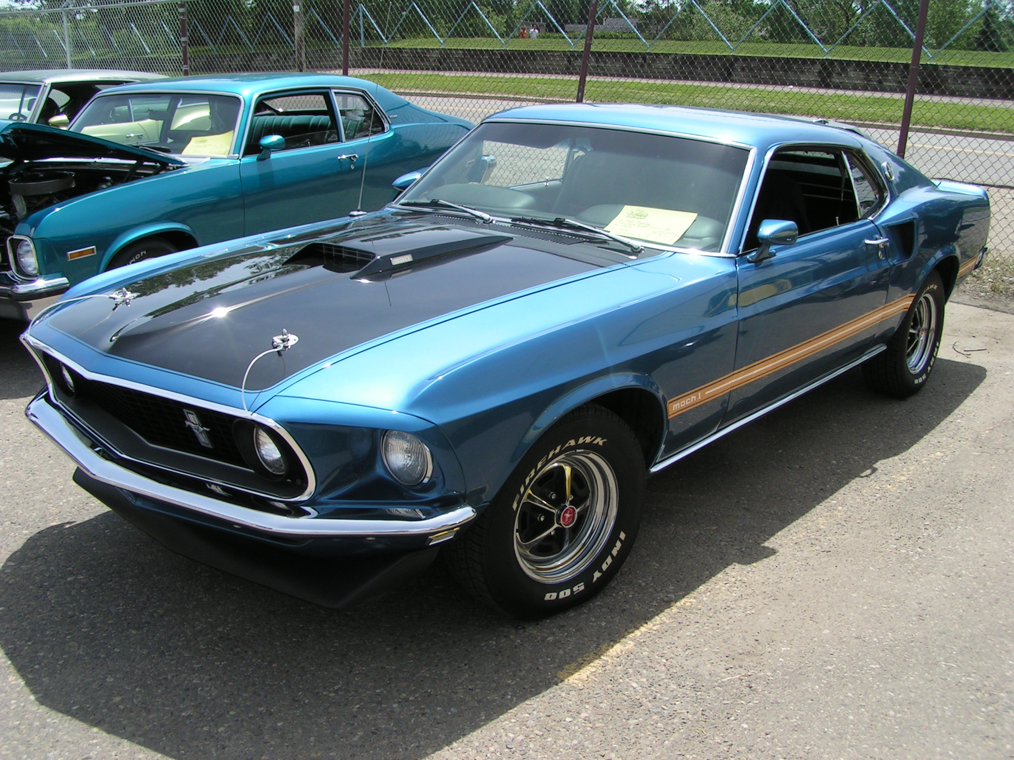 1969 Ford Mustang